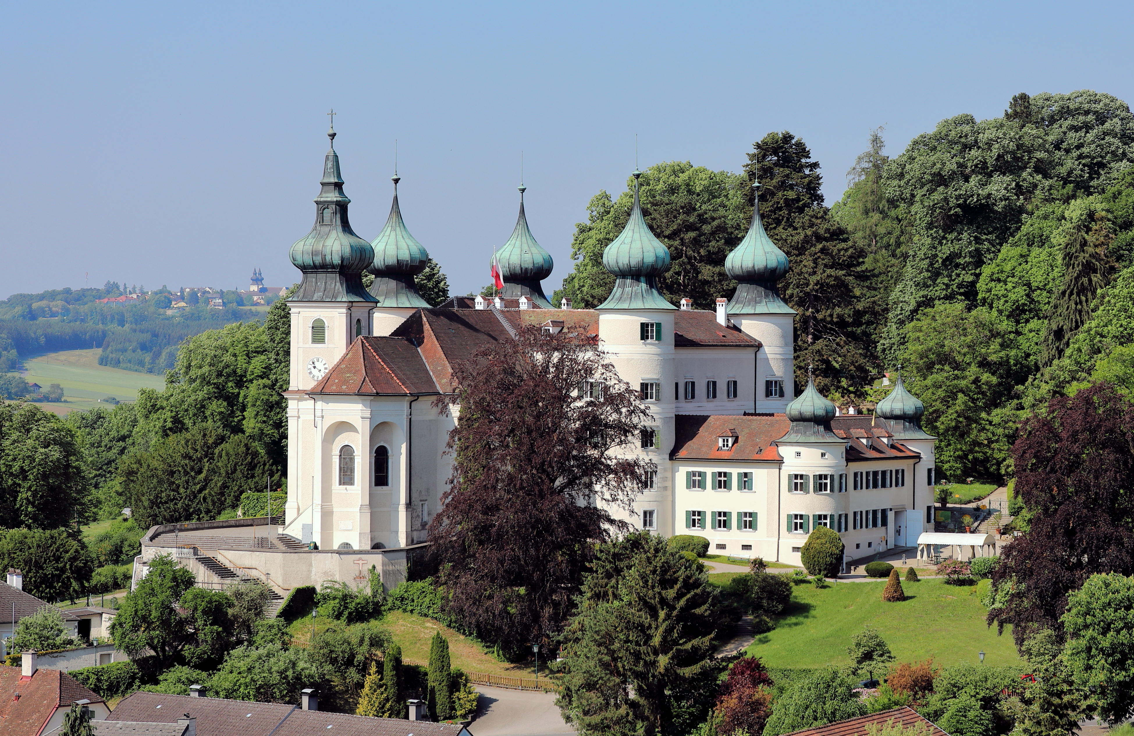 Ostnordostansicht des Schlosses Artstetten in der niederösterreichischen Marktgemeinde Artstetten-Pöbring und links im Hintergrund Maria Taferl mit der Wallfahrtskirche Maria Taferl.Das historistisch erweiterte und mehrfach umgebaute Renaissanceschloss wurde in der 2. Hälfte des 16. Jahrhunderts wahrscheinlich auf den Grundfesten einer mittelalterlichen Burg errichtet. Ende des 17. Jahrhunderts erfolgte der Umbau bzw. Erweiterung zu einer vierflügelige Anlage mit Arkadenhof und die Schlosskapelle wurde vergrößert, so dass die ursprünglich freistehende Schlosskapelle mit dem Schlossgebäude verbunden war. Im 19. Jahrhundert fand eine Aufstockung sowie ein nordseitiger Zubau statt und das Schloss erhielt damit weitgehend sein heutiges Erscheinungsbild.